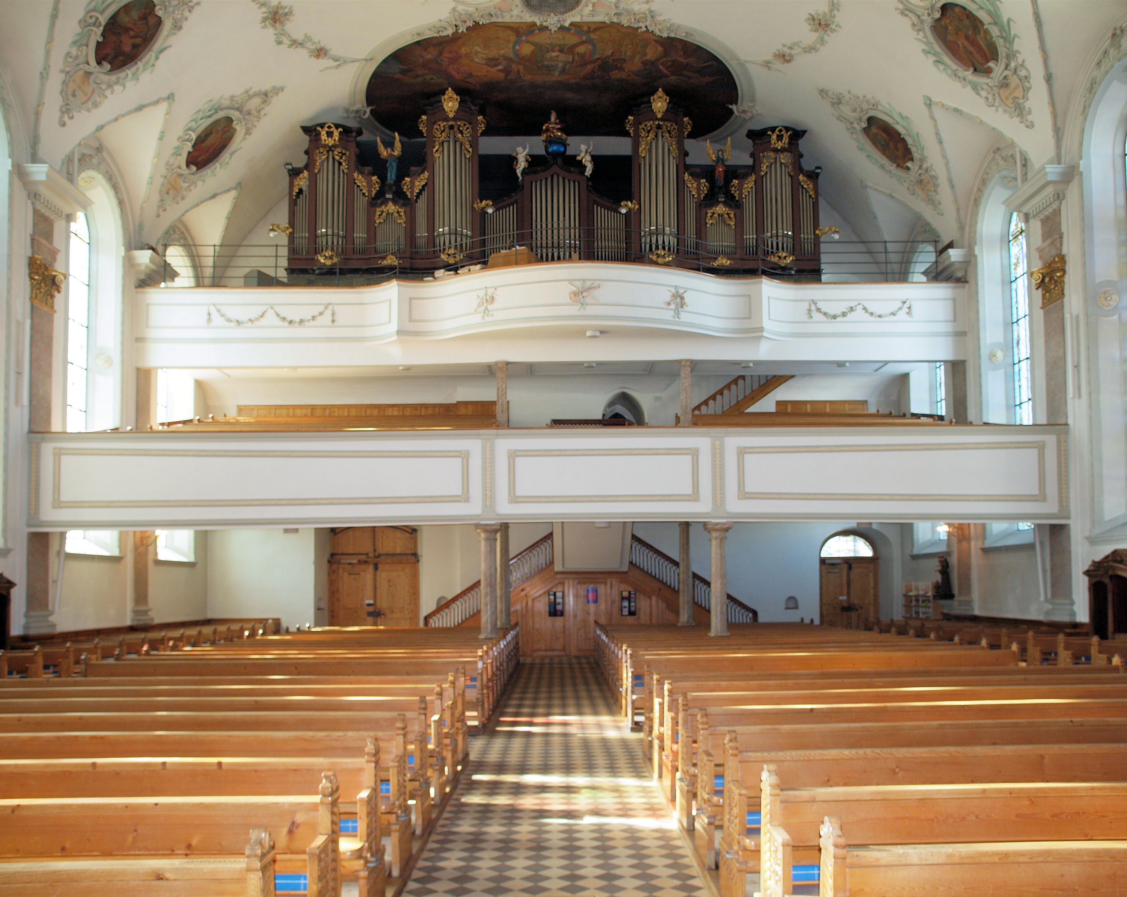 Innenraum der Pfarrkirche St. Mauritius in Appenzell. Vor dem dem Chor stehend in Richtung Westen schauend, mit der Empore der Orgelempore.